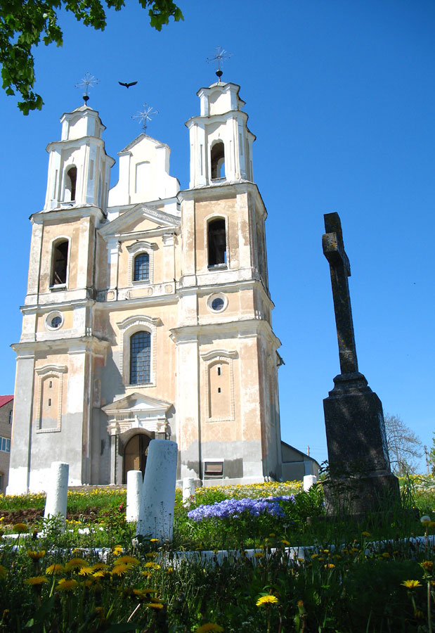 Беларуская (тарашкевіца): Германавічы